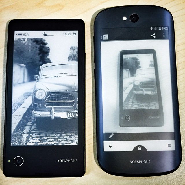 Первый и второй йотафоны